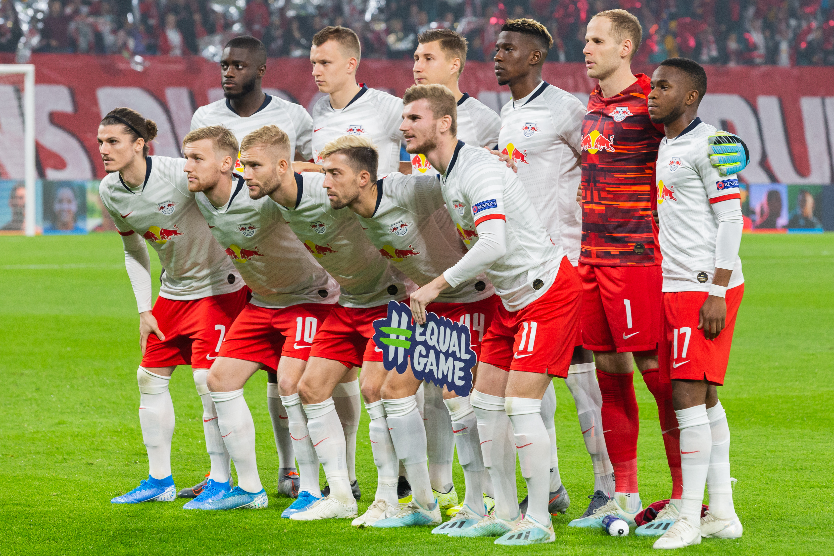 Fußball, Männer, UEFA Champions League, RB Leipzig - FC Zenit St. Petersburg; Mannschaftsfoto, Aufstellung, team photo RB Leipzig